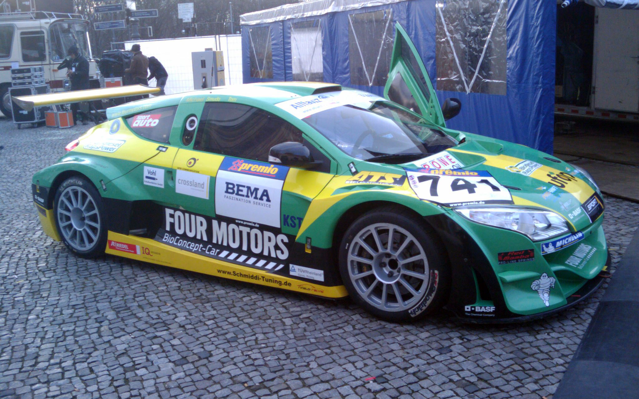 Smudos Four Motors Renault Mégane Trophy at "Sebastian Vettels Ehrenrunde in Berlin".